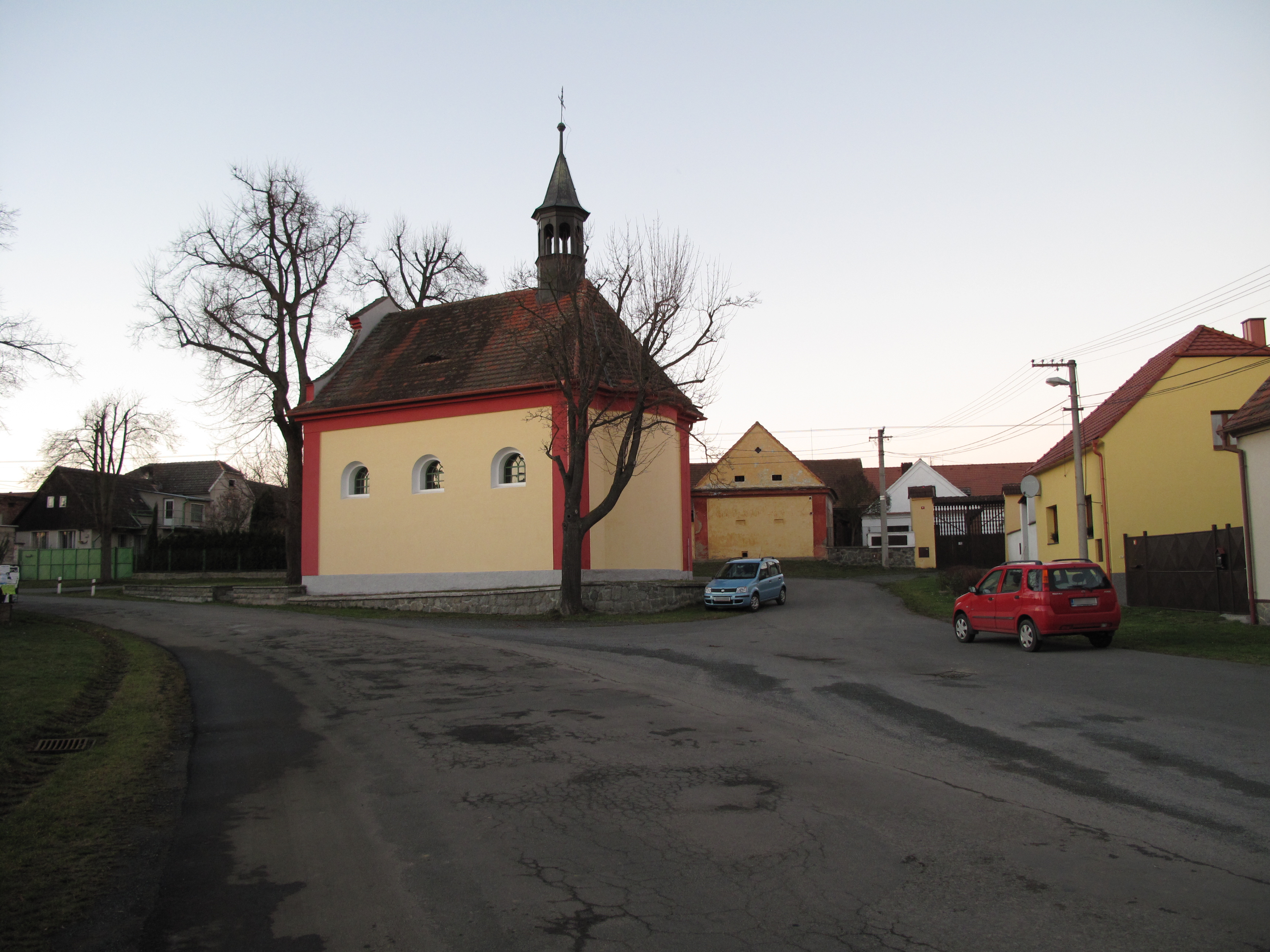 Kaple v Otěšicích. Okres Plzeň-jih, Česká republika.